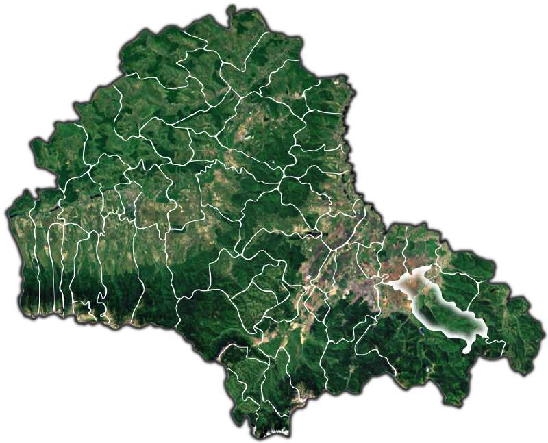 Tarlungeni jud Brasov